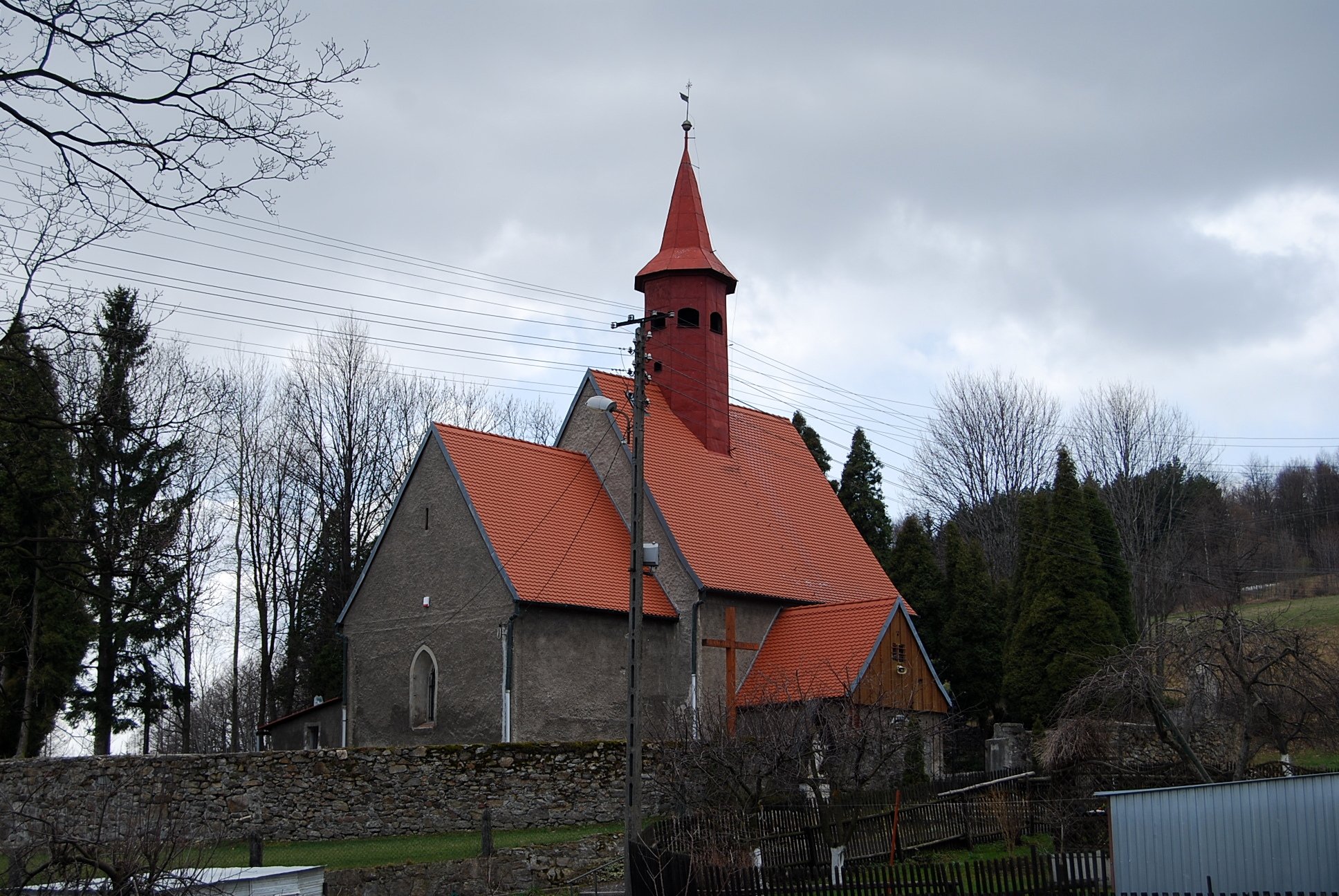 Piechowice Piastów - kościół filialny pw. Bożego Ciała (zabytek nr 715/J z dn. 11.01.82)